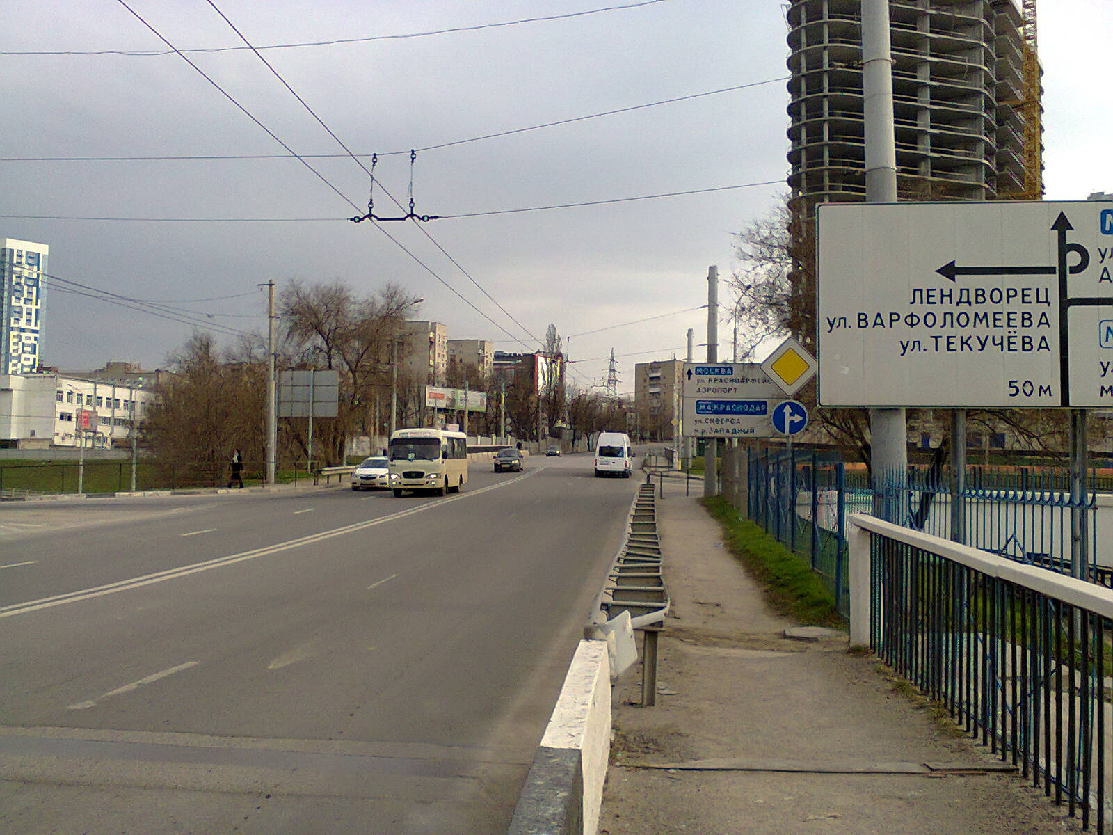 Ростов-на-Дону, начало улицы Красноармейской, вид с моста через реку Темерник.